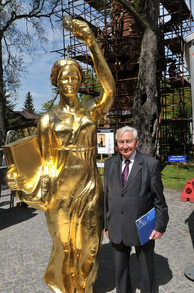 Prof. Bolesław Mazurkiewicz przy złotej rzeźbie Alegorii Nauki